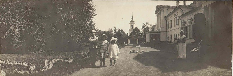 Savva Morozov's children in the Pokrovskoye Estate